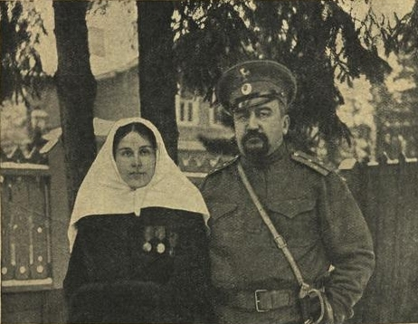 Александр Куприн, призванный на войну в чине поручика и его жена, отправляющаяся на войну сестрой милосердия